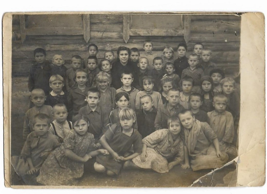 Ученики начальных классов Бобровской средней школы. 1948/1952 годы.